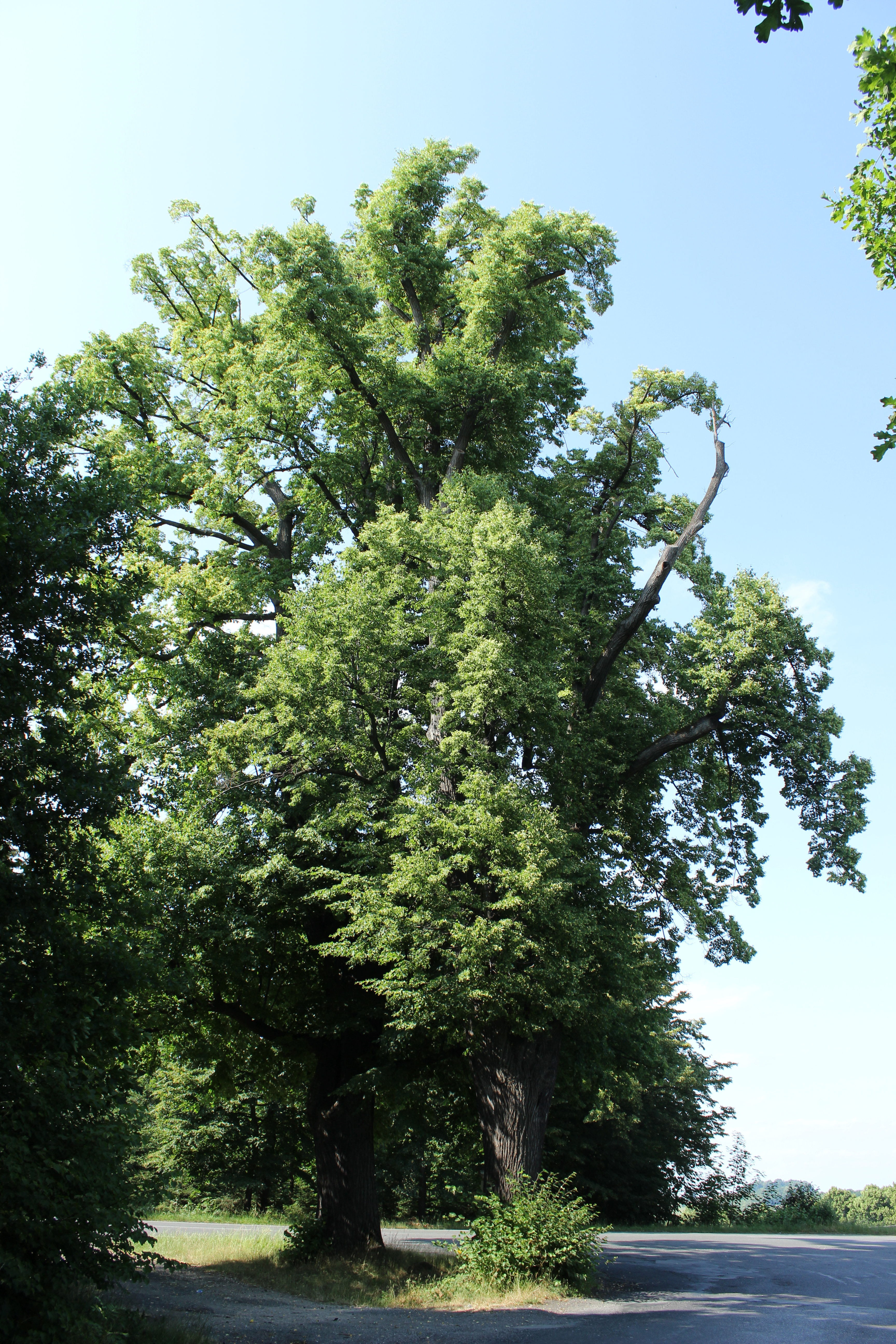 Dva památné stromy na křižovatce silnic II/291, III/2909 a III/2912 východně od města Frýdlant ve Frýdlantském výběžku na severu České republiky.